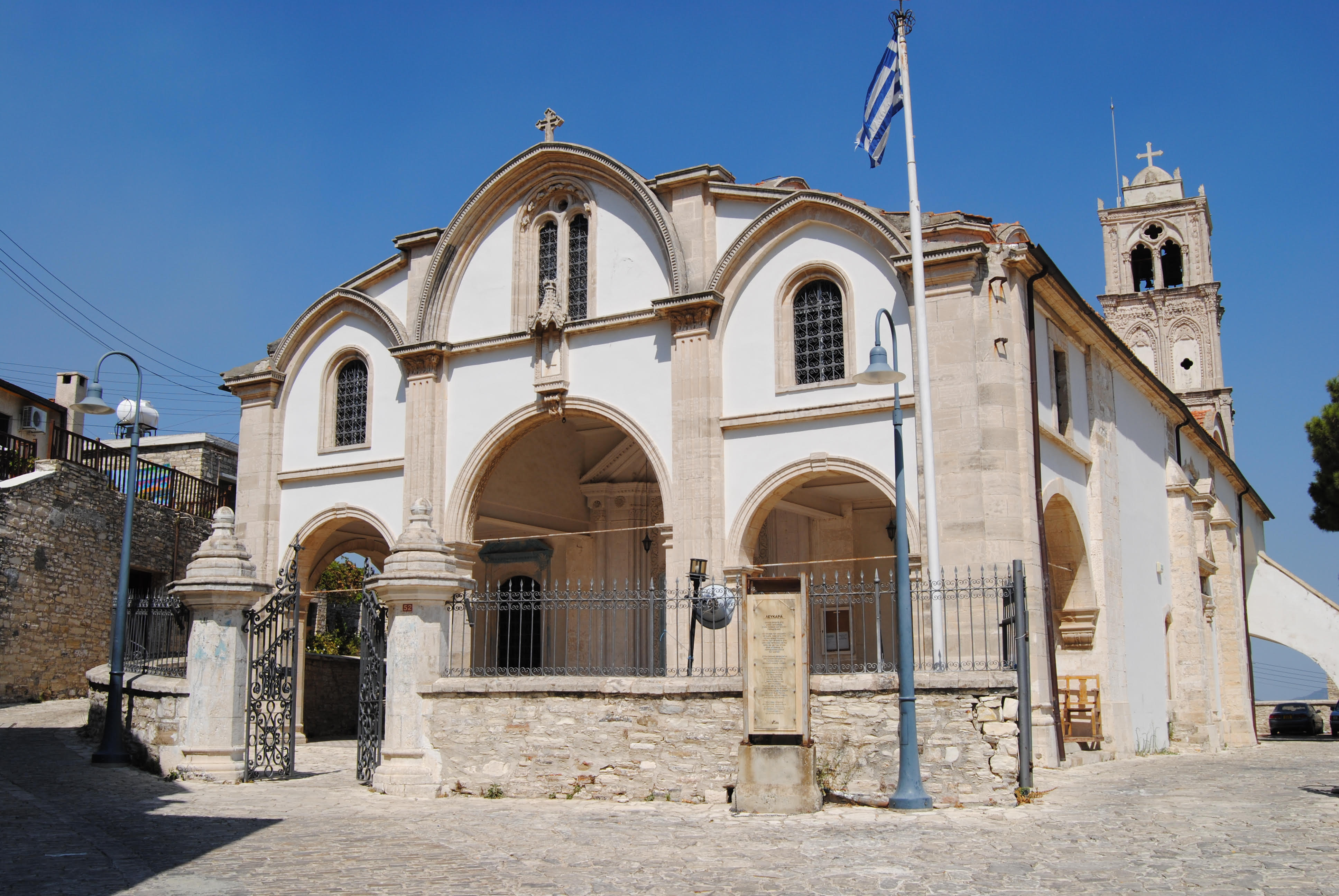 Ekklisia akanthou